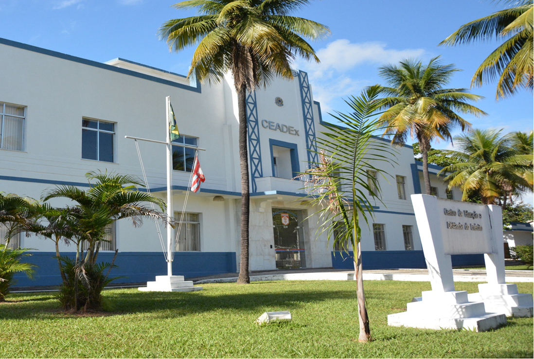 A foto é do Centro de Educação a Distância do Exército